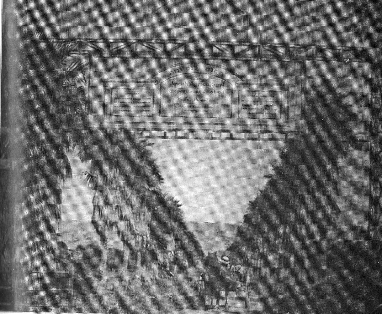 שדרת הוושטינגטוניות בחוות אהרנסון